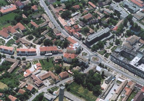 Mezőberény, Hungary, aerialphotography